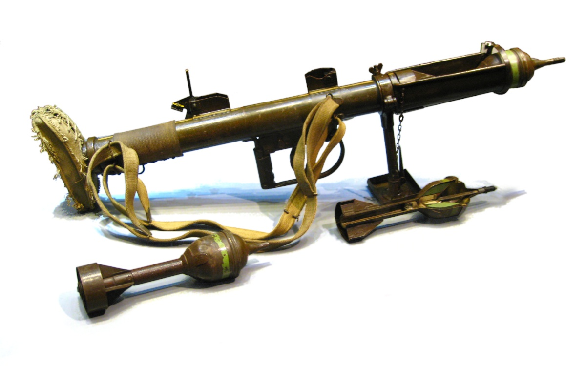 PIAT